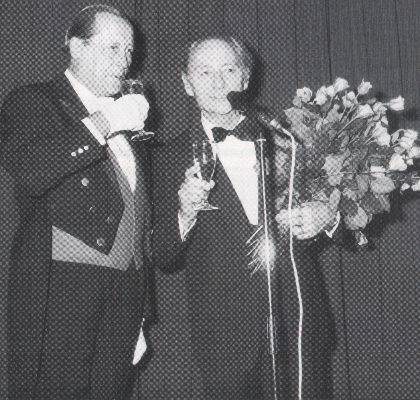 Bildunterschrift: Butler der Nation, Martin Jente, überbrachte mitternächtliche Geburtstagswünsche für Heinz Müller. Aufgenommen anlässlich der Modenschau zum 65. Geburtstags des Pelzkonfektionärs Heinz Müller, seit 1945 tätig in Frankfurt am Main (geb. 5. Dezember 1914) im Bankettsaal des „Hotel Frankfurter Hof“. Martin Erich Bernhard Jente (* 6. Januar 1909 in Görlitz; † 14. Februar 1996 in Wiesbaden) war ein deutscher Journalist, Schauspieler und Fernsehproduzent.